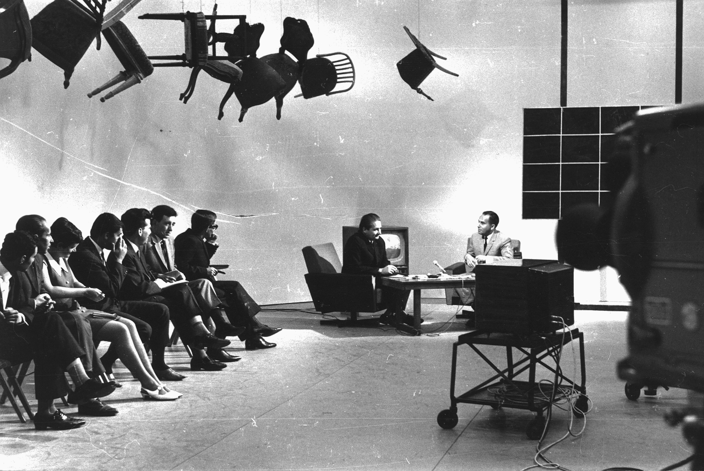 jobbra szemben Vitray Tamás a Tizenkét szék című műveltségi vetélkedő vezetője.'Tizenkét szék' literacy quiz tv program Location: Hungary, Budapest V. Tags: Hungarian TV, Budapest Title: jobbra szemben Vitray Tamás a Tizenkét szék című műveltségi vetélkedő vezetője.